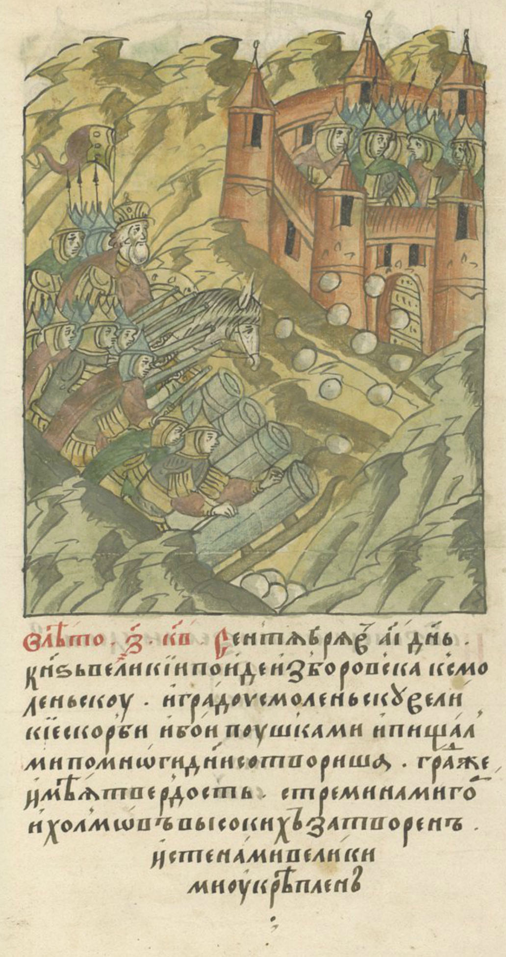 Лицевой летописный свод. 11 сентября 1513 г., Смоленск. В лето 7022 сентября в 11 день, князь великий поиде из Боровска к Смоленьску, и граду Смоленьску великие скорби и бои пушками и пищалми по многи дни сотвориша; град же имея твердость, стреминами гор и холмов высоких затворен и стенами великими укреплен, и князь великий, всю землю пленив, возратися на Москву.